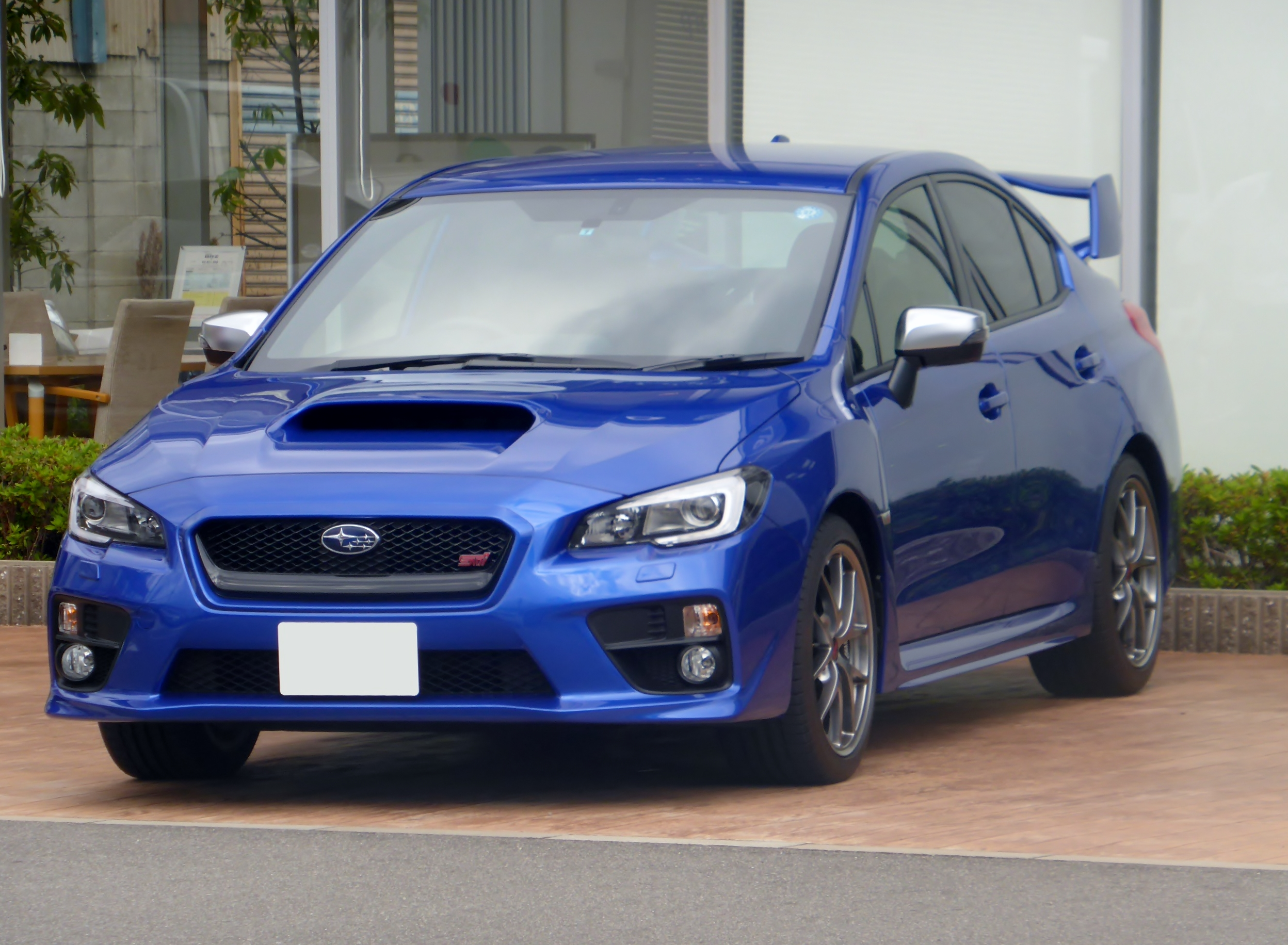 VAB型スバル・WRX STI タイプSをフロントから撮影。